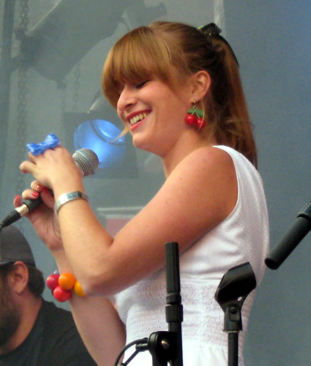 Louise Dubiel i Hjørring, 2010